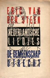 Omslag van het boek Nederlandsche liedjes van de Nederlandse schrijver Eric van der Steen. Het ontwerp is in 1932 gemaakt door Andries Oosterbaan (1882-1935). Zie Lex van de Haterd: 'Van boekbinder tot grafisch vormgever'. In: Zacht Lawijd, 3: 1 (2003)